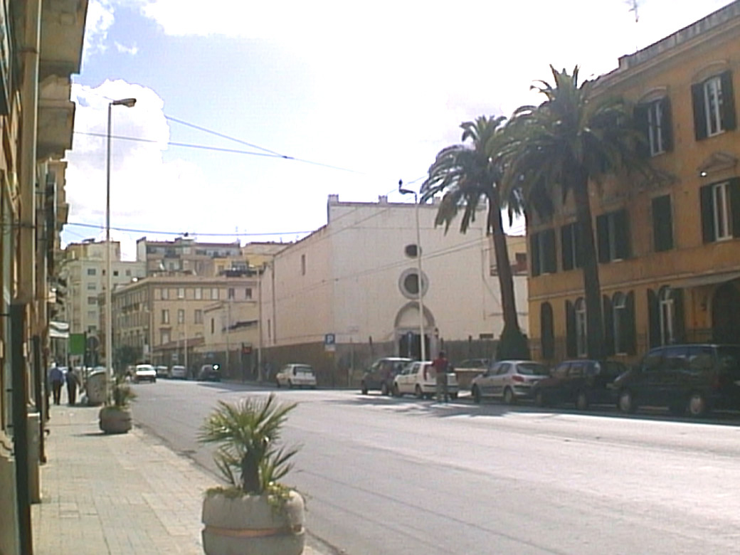 Chiesa di San Benedetto, XVII secolo, Cagliari